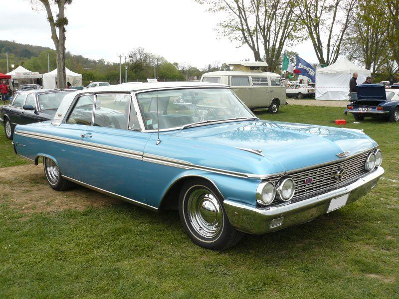 Mantes la Jolie 2012